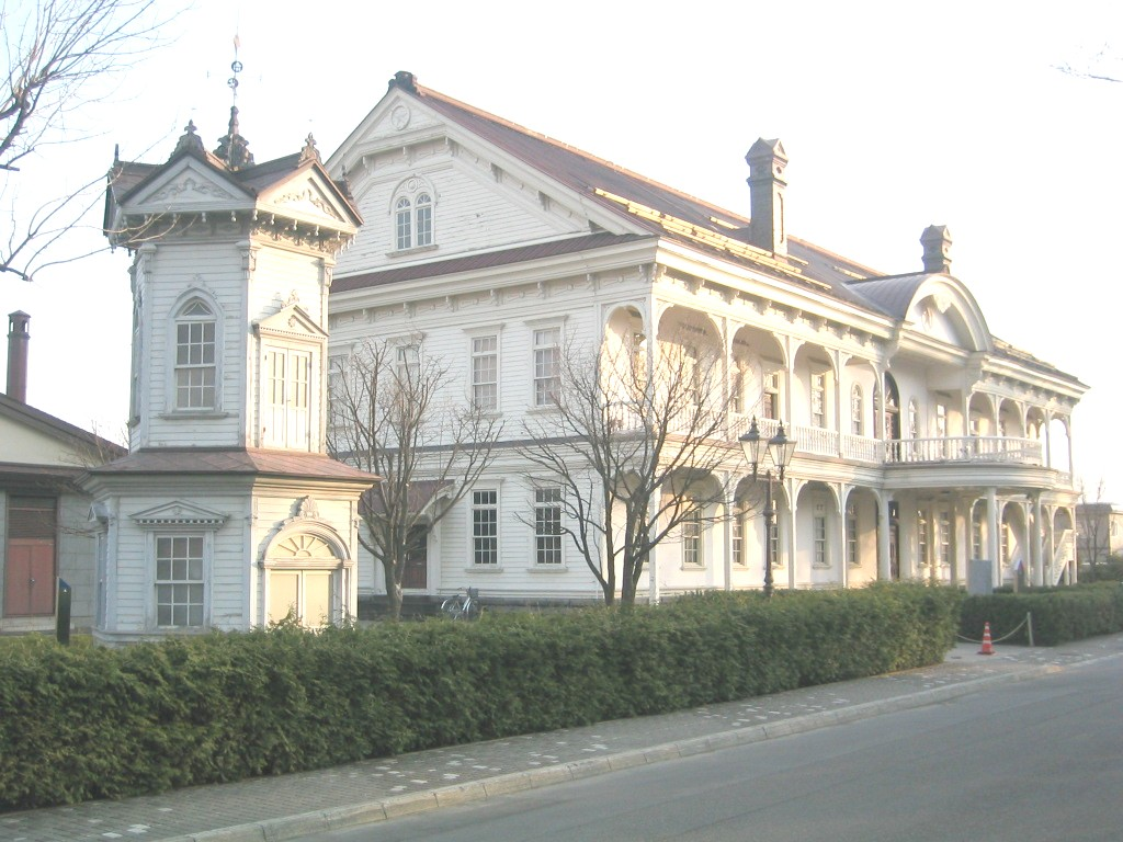 投稿者が撮影 撮影年月日：2010年5月5日 北海道旭川市の旧旭川偕行社